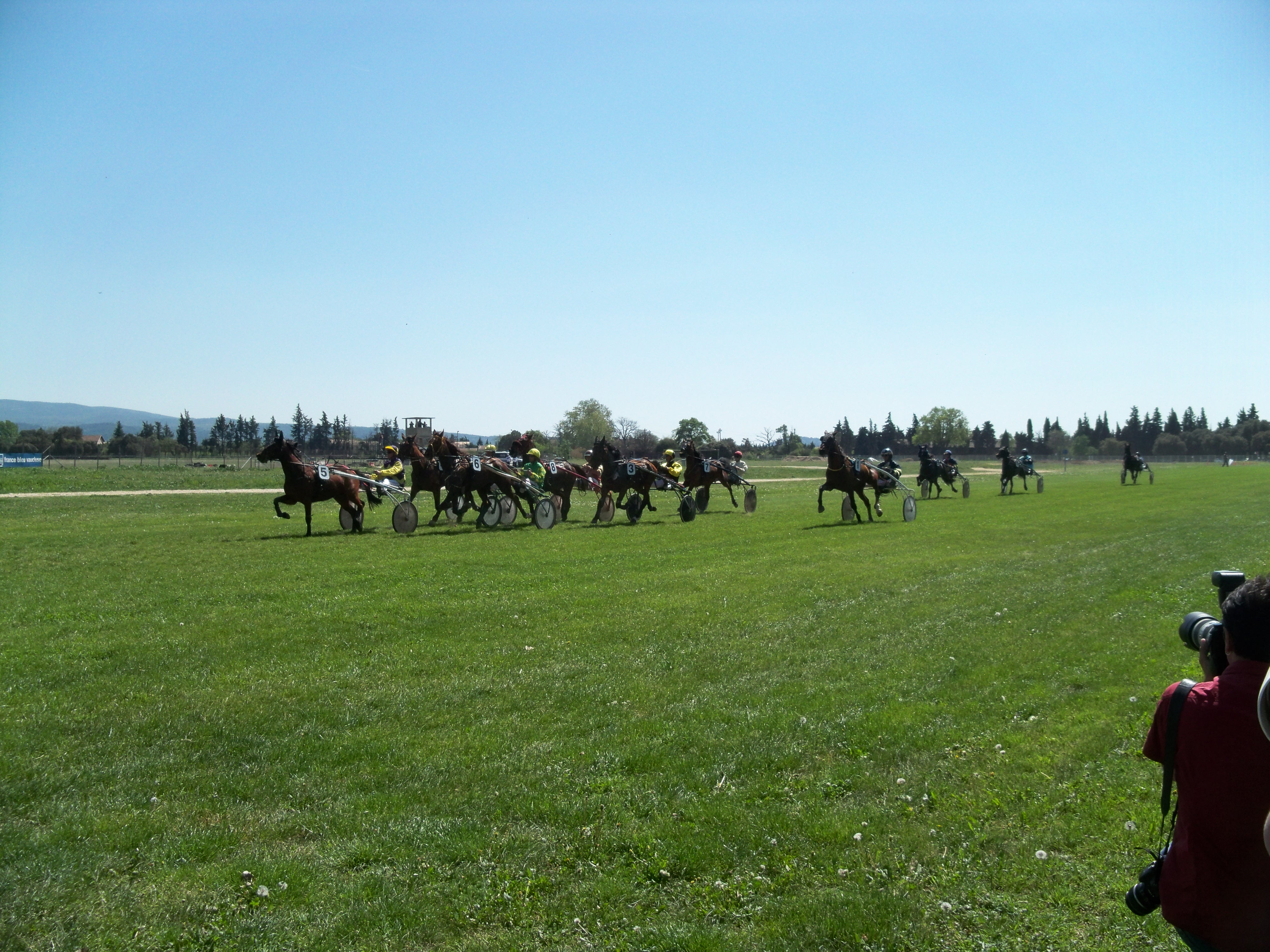 Course à Saint Ponchon, Carpentras (84)